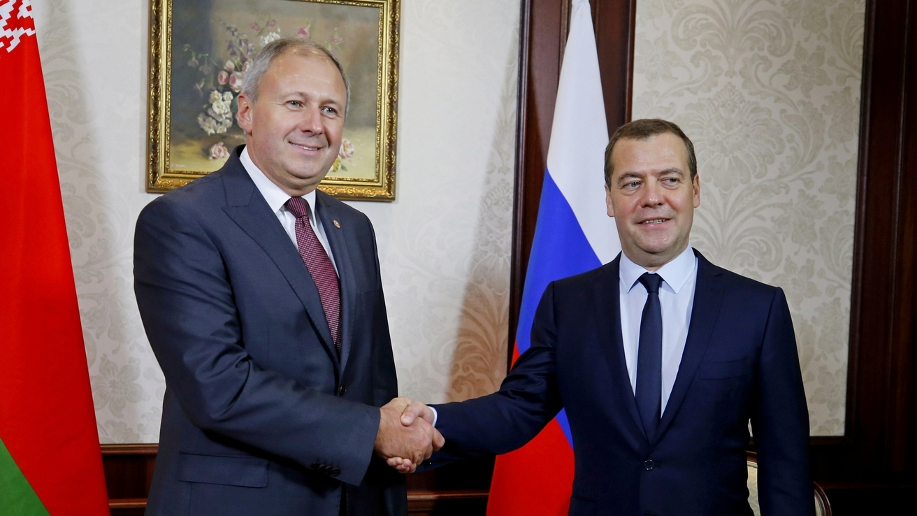 Встреча Дмитрия Медведева с Премьер-министром Белоруссии Сергеем Румасом